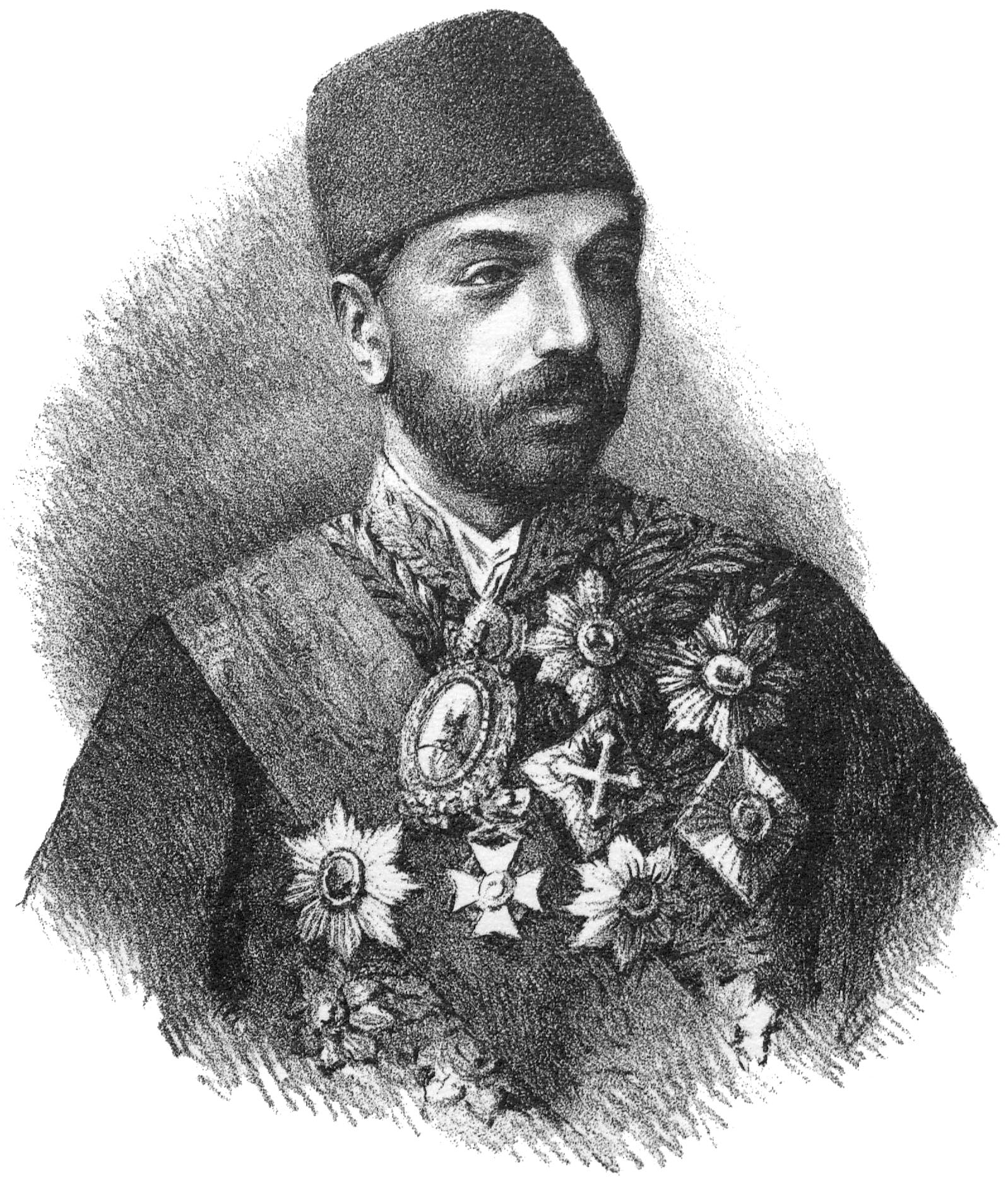 میرزا علی‌خان امین‌الدوله